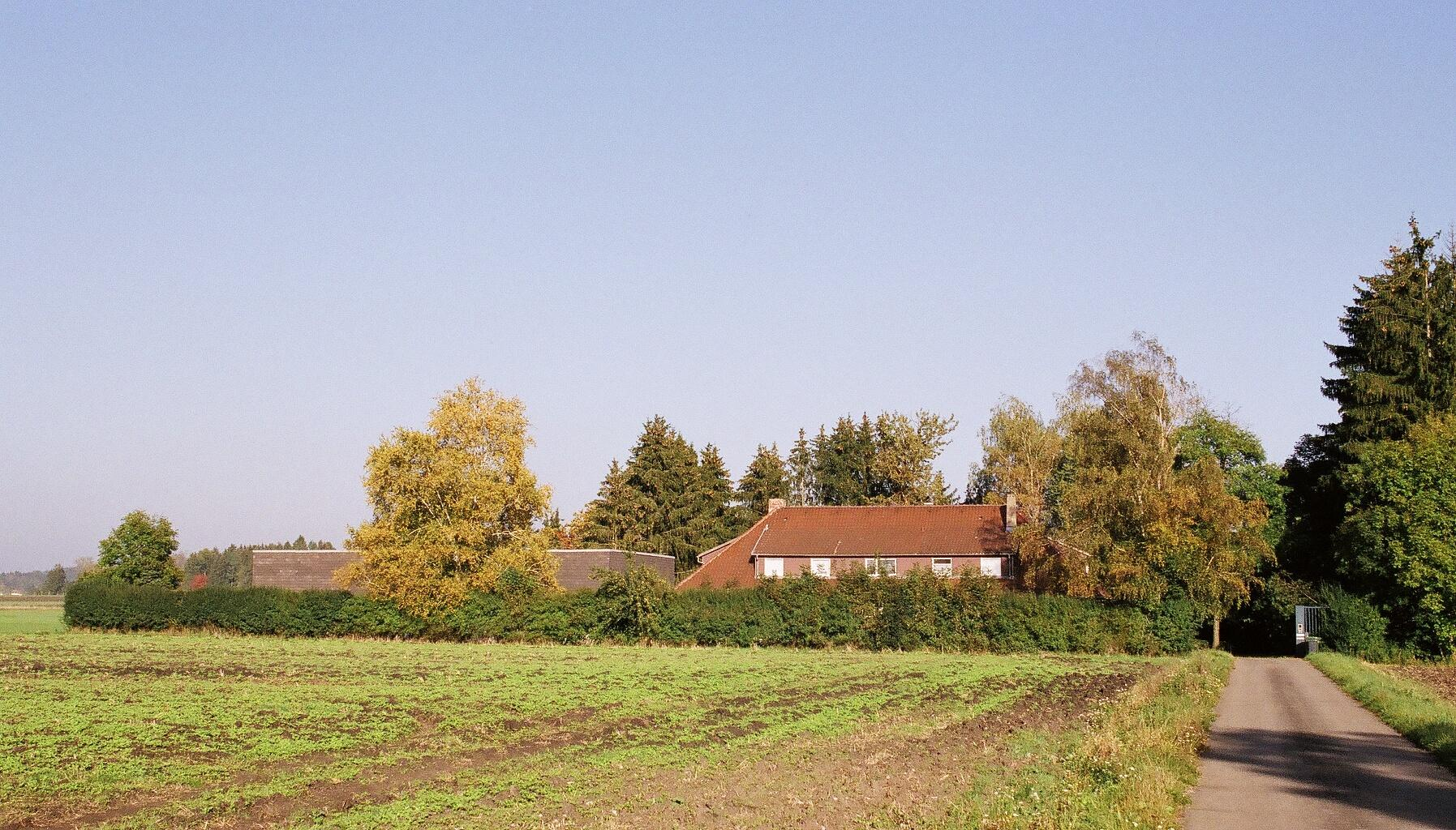 Sendergebäude des einstigen Rundfunksenders Bad Dürrheim (heute als Wohnhaus genutzt)